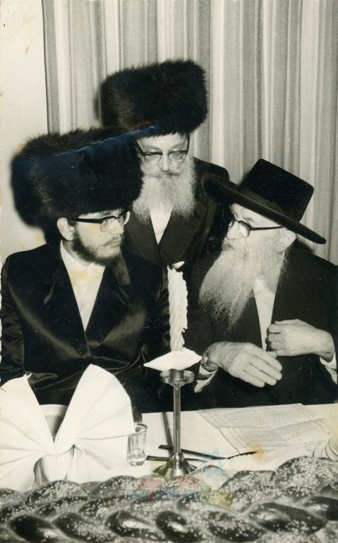 הרב לנדא, רב בני ברק, עם הכתובה לפני החופה. עומד משה יצחק רושגולד אב החתן יושב משמאל החתן ברוך בנימין. החתונה נערכה באולמי מודיעין ב-ח' בכסלו תשכ"ז.